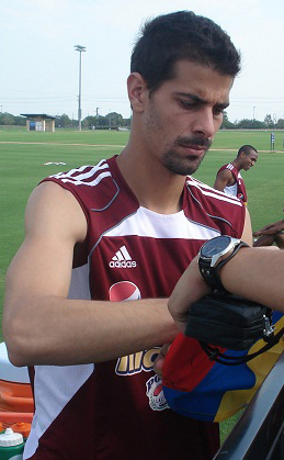 Dani Hernandez